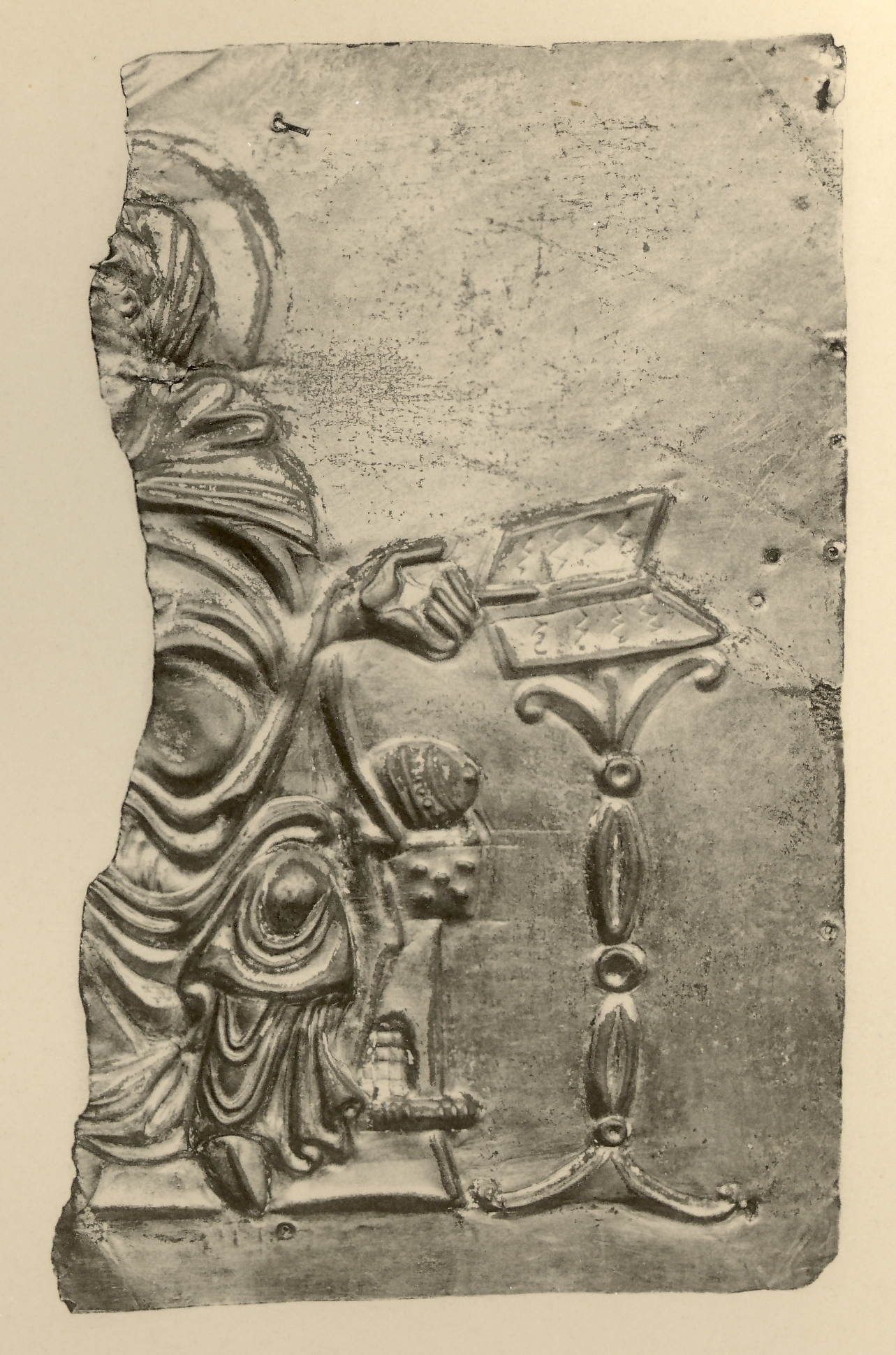 Fragment einer Treibarbeit, mutmaßlich vom Ida-Kreuz aus dem 10. Jahrhundert. Essener Domschatzkammer Inv. Nr. 11